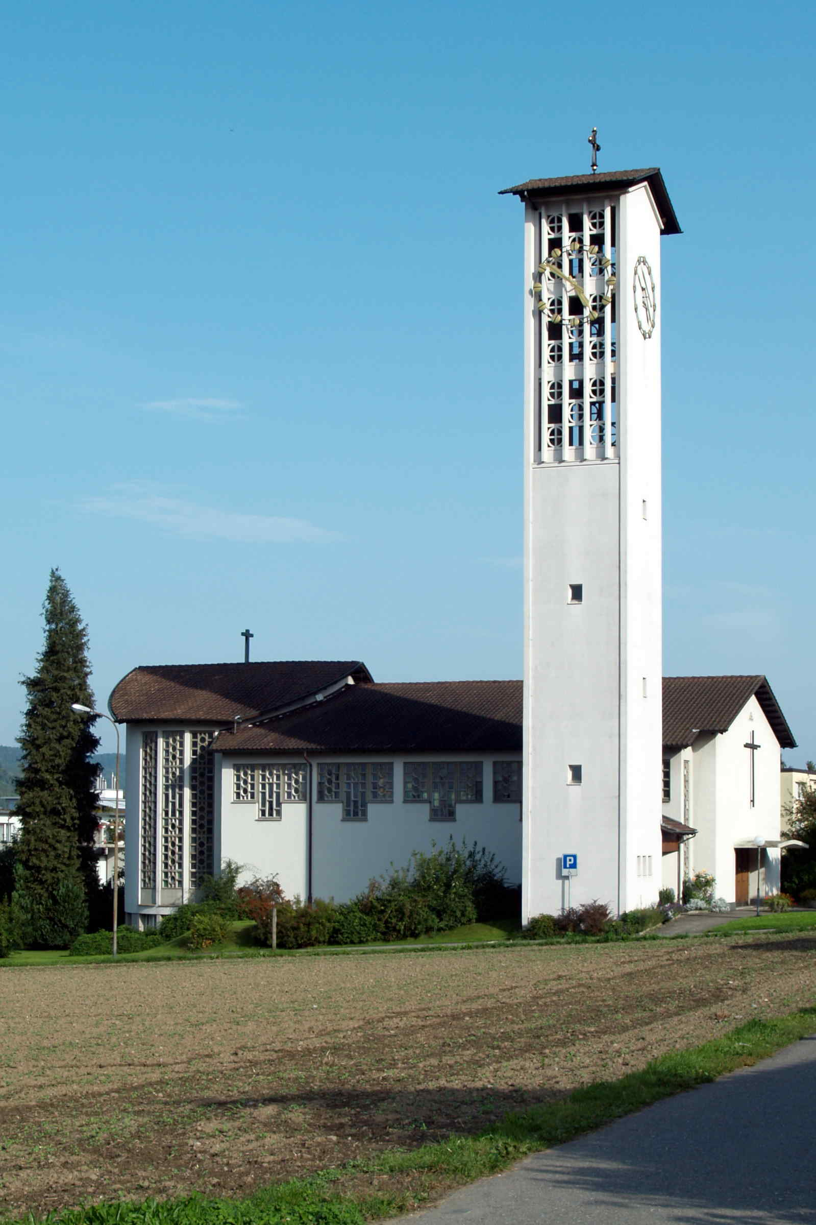 Katholische Kirche von Killwangen in der Schweiz